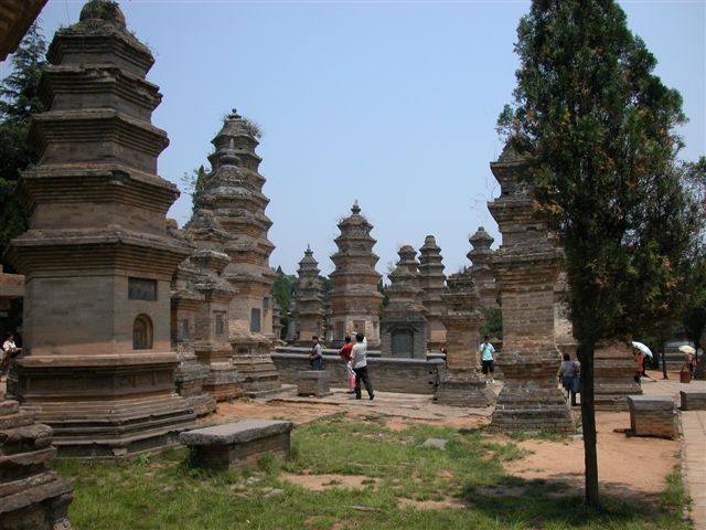 Pagodes du monastère Shaolin